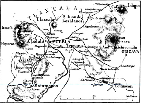 Carte du theatre de la guerre au Mexique